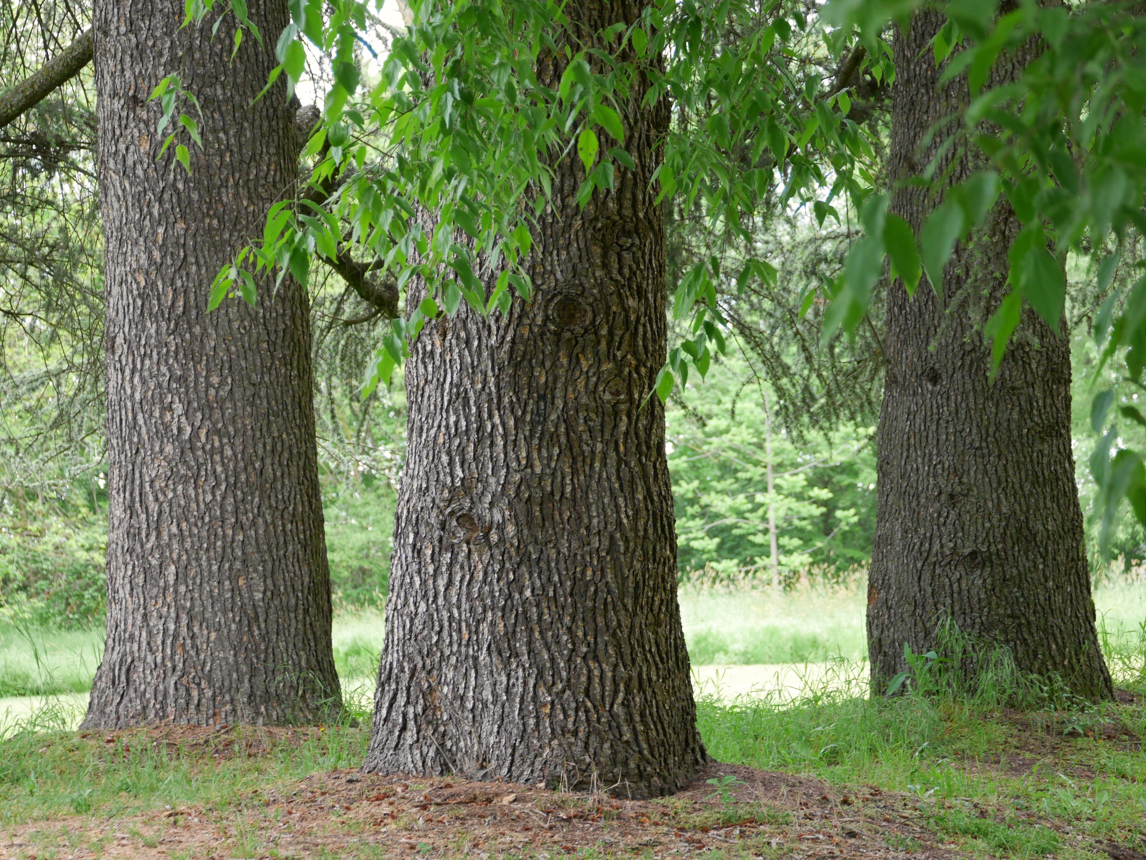 sequoia sempreverde This is a photo of a monument which is part of cultural heritage of Italy.